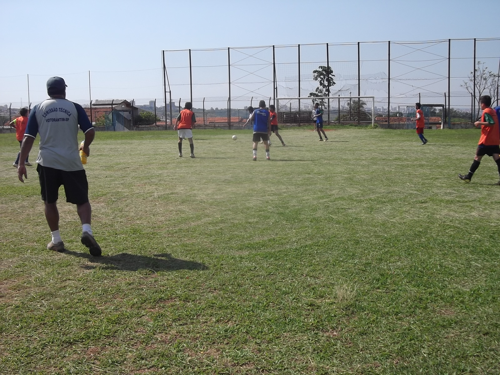 Treino no Centro de Treinamento da Associação Desportiva Social Votorantim